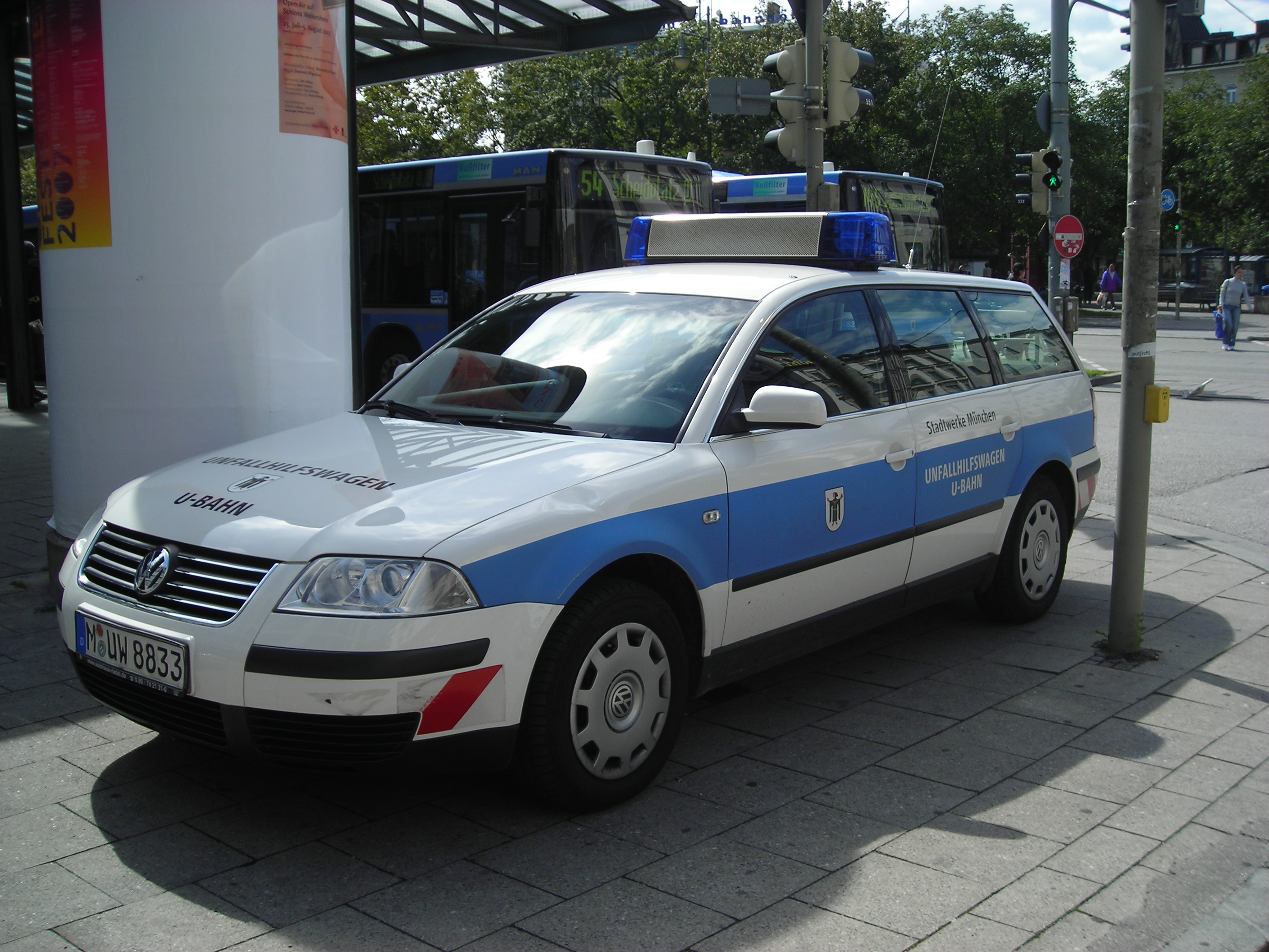 Unfallhilfswagen der U-Bahnwache München (Aufschrift: “Stadtwerke München Unfallhilfswagen U-Bahn” nebst Wappen der Landeshauptstadt München